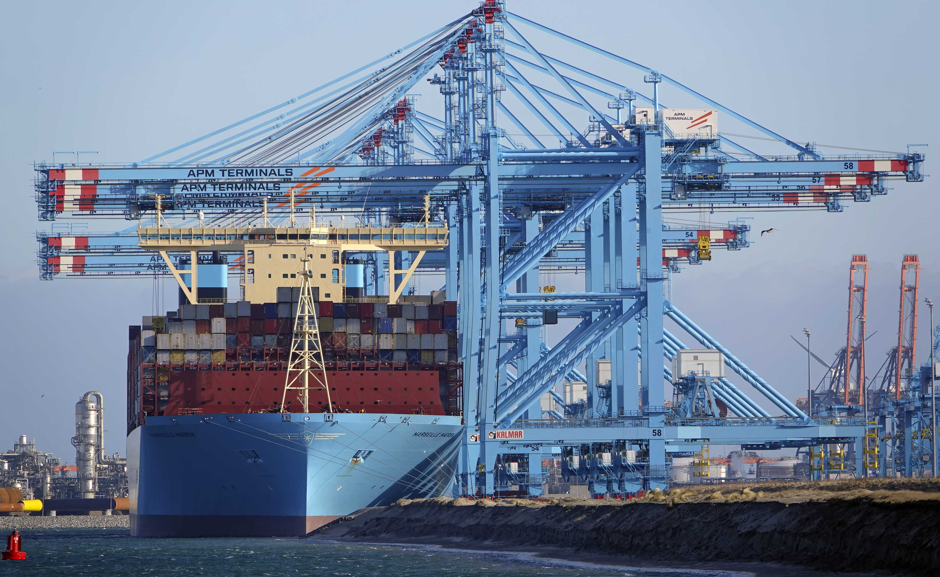 11-2-2018 Maasvlakte 2